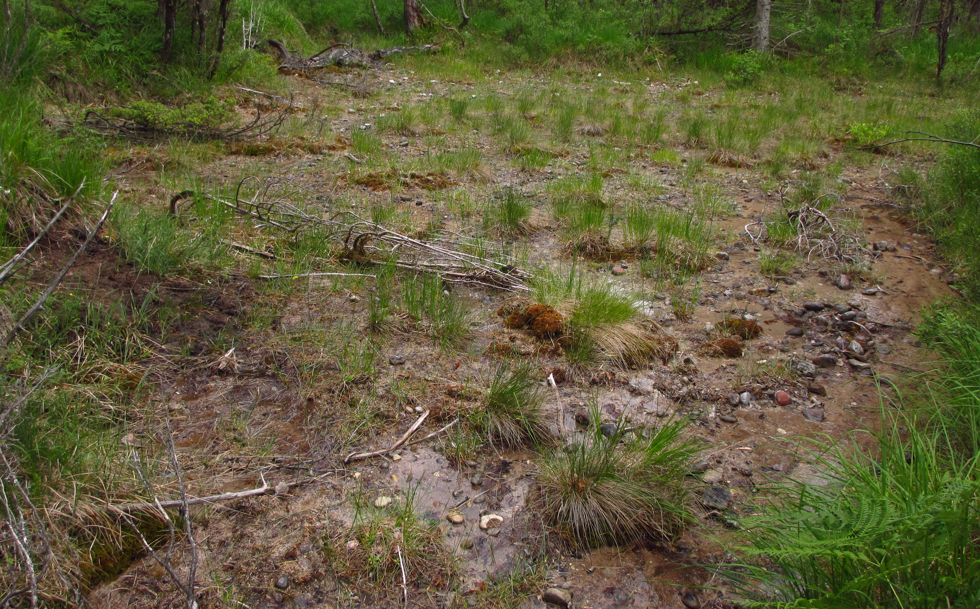 Viidumäe looduskaitseala